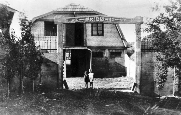 שער קבוץ גן-שמואל שנבנה בשנת תרפ"ד 1922. מאחוריו בניין הרפת,למעלה גרו חברים יחד עם המזון לפרות,ולמטה שוכנו הפרות.